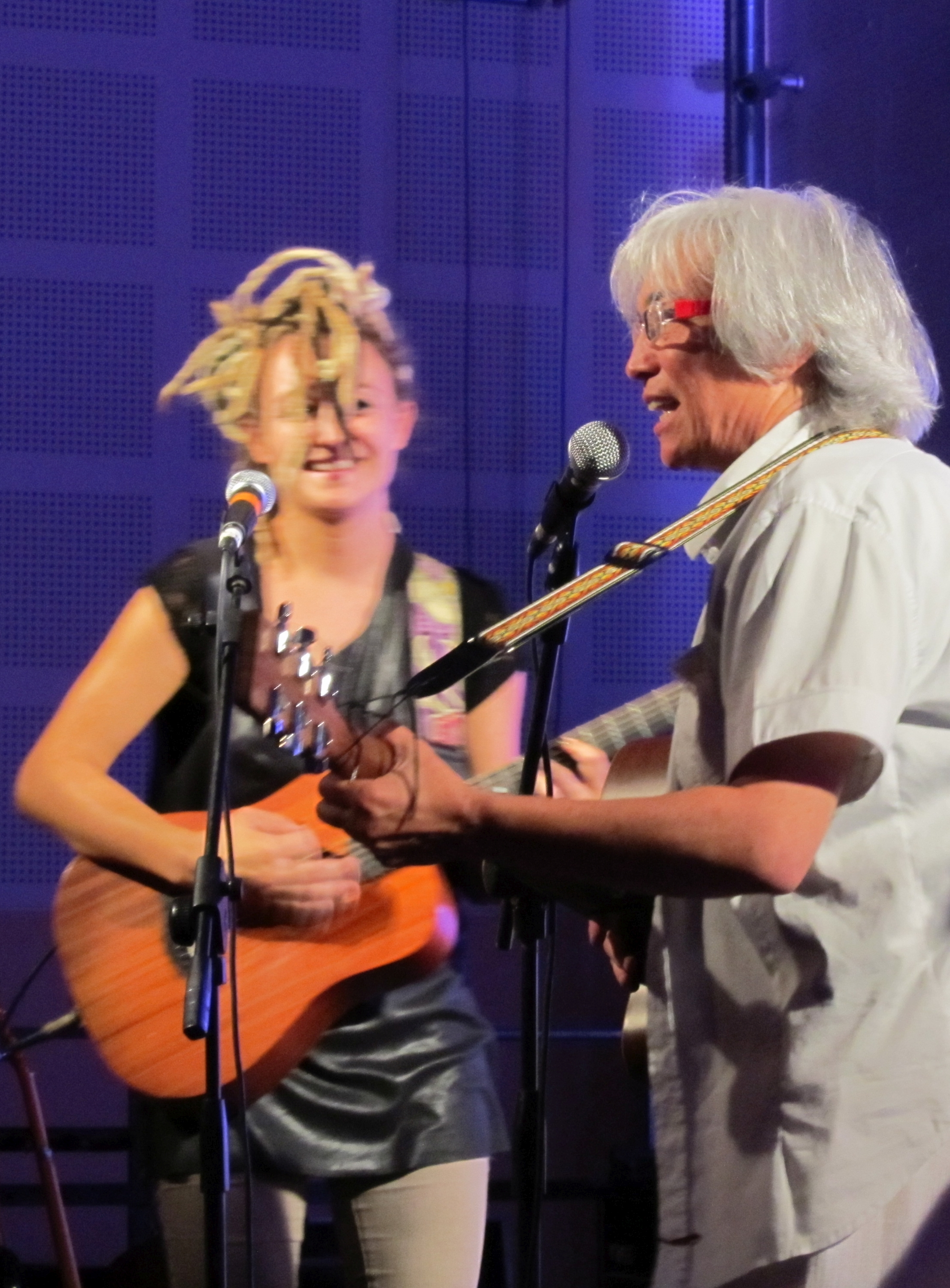 Concerto Artisti valdostani per l'Emilia (Cittadella di Aosta, 8 luglio 2012): Naïf Hérin e Maura Susanna